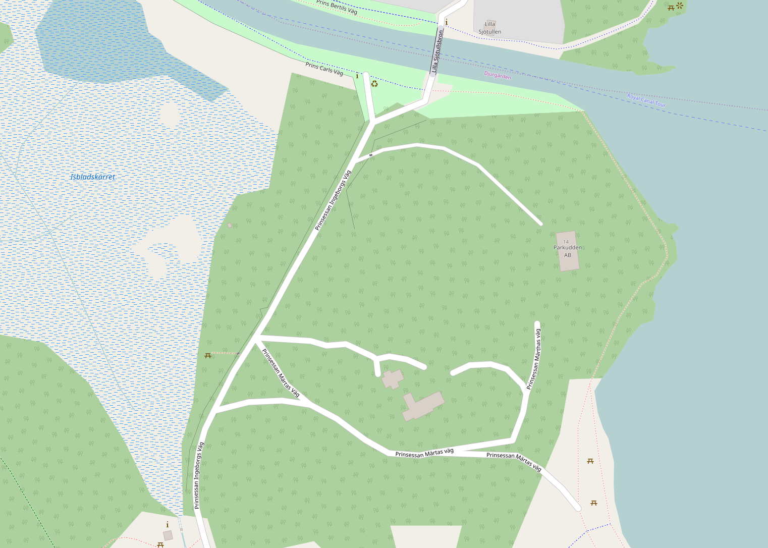 Karta över Prinsessan Märta väg där även de närliggande promenadvägarna Prinsessan Ingeborgs och Prins Carls väg framkommer. Data från OpenStreetMap har gjorts tillgänglig under licensen Open Data Commons Open Database License (ODbL).